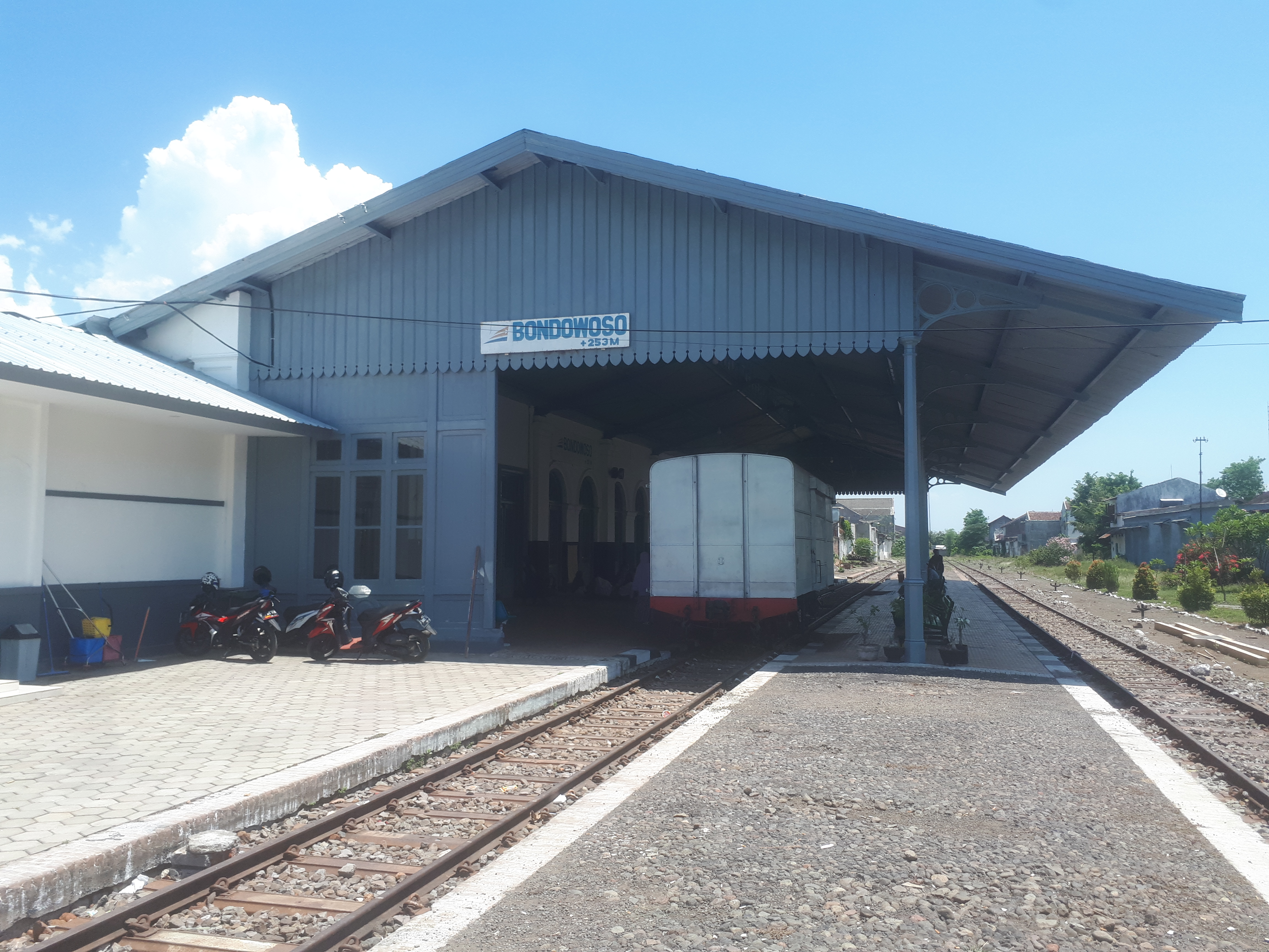 Bagian peron Museum Stasiun Bondowoso akhir 2019. Terdapat gerbong pupuk terparkir di jalur 1